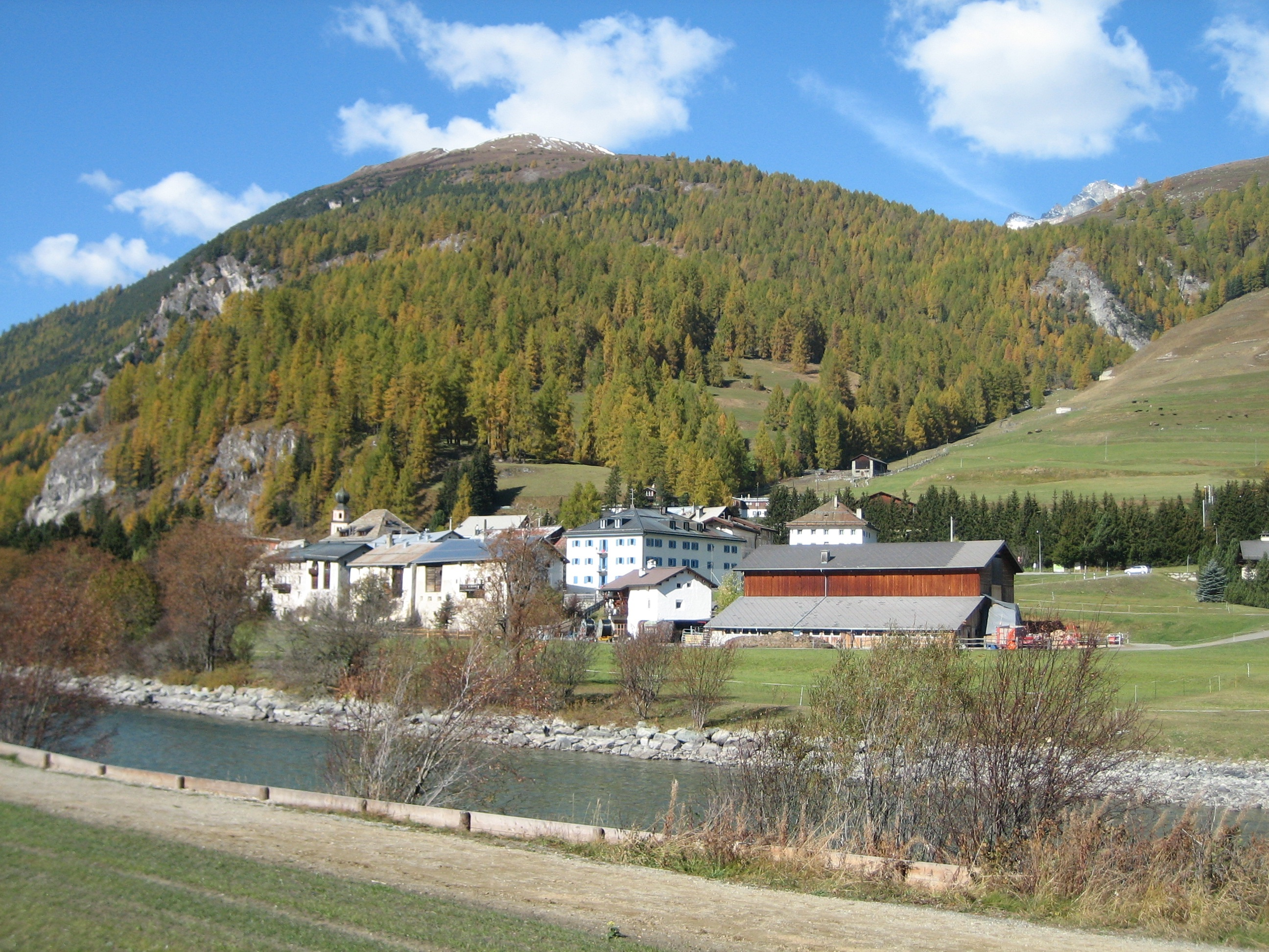 Madulain